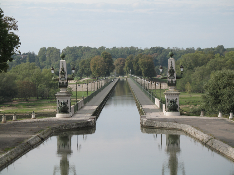 Pont canal de BRIARE (45250) sur le canal latéral à la Loire.